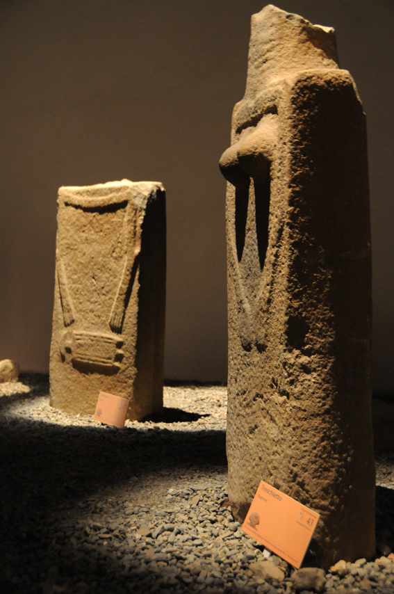 Statua stele femminile "Treschietto" (Pontremoli - Museo delle Statue Stele Lunigianesi